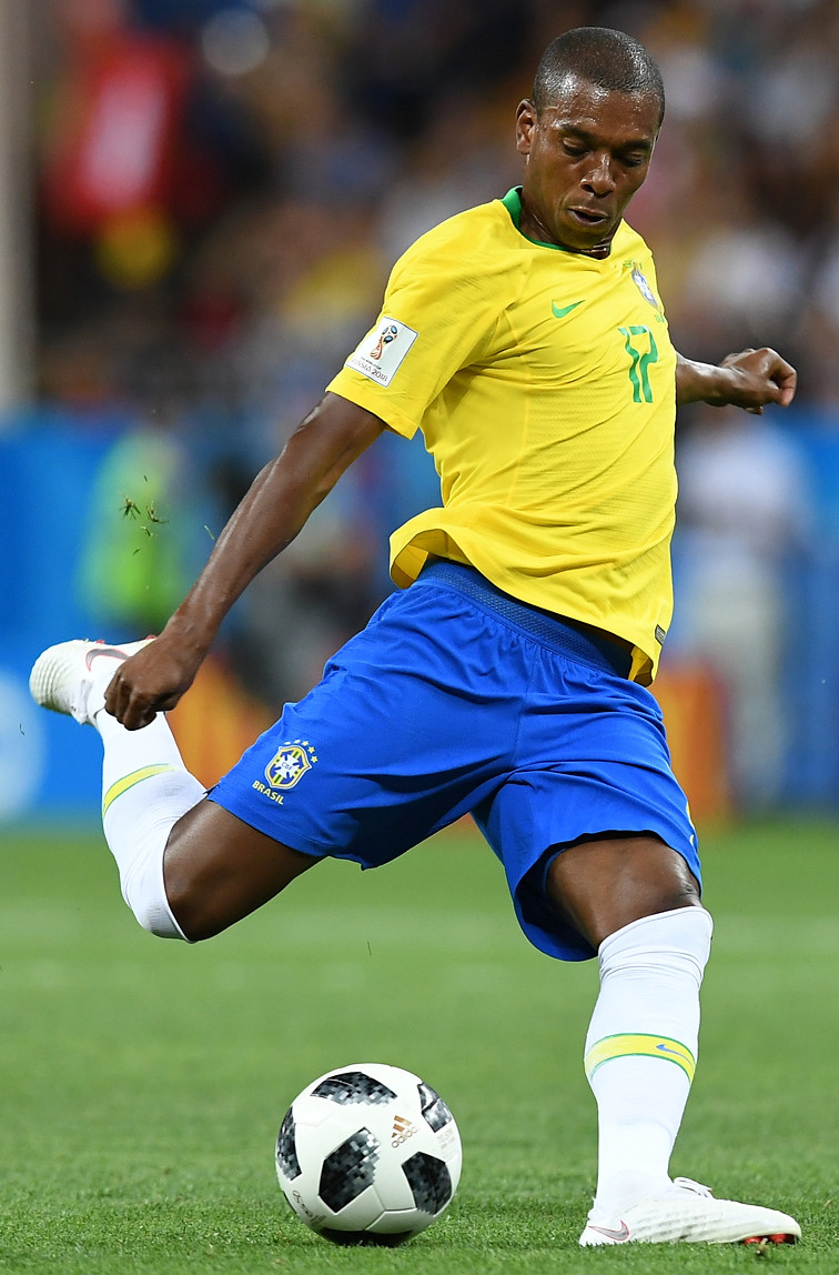 Желто-зеленая торсида на берегах Дона. Неймар и Бразилия пожаловали в Ростов!